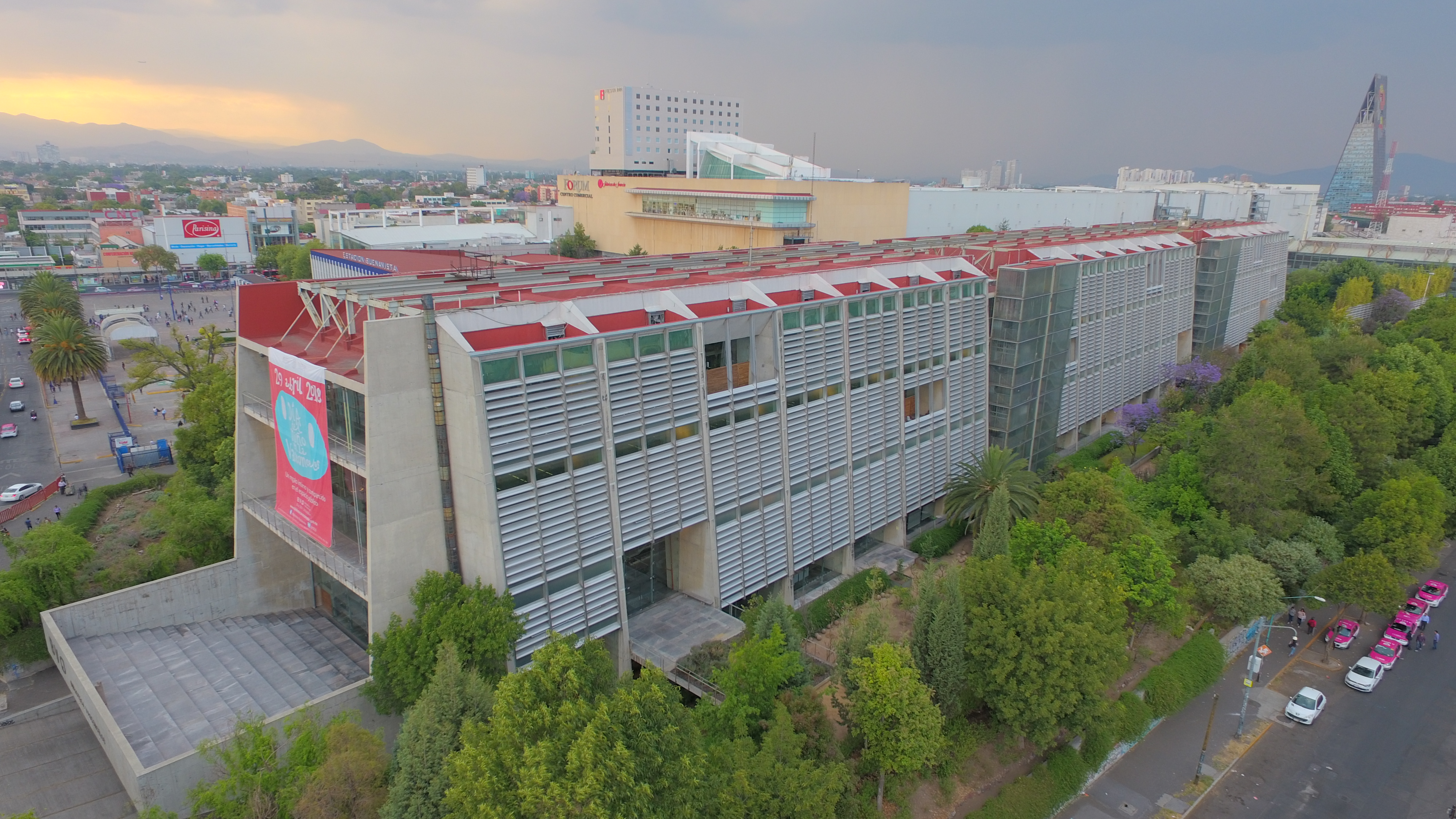 Biblioteca Vasconcelos, Torre Insignia, Forum Buenavista, Estación Buenavista